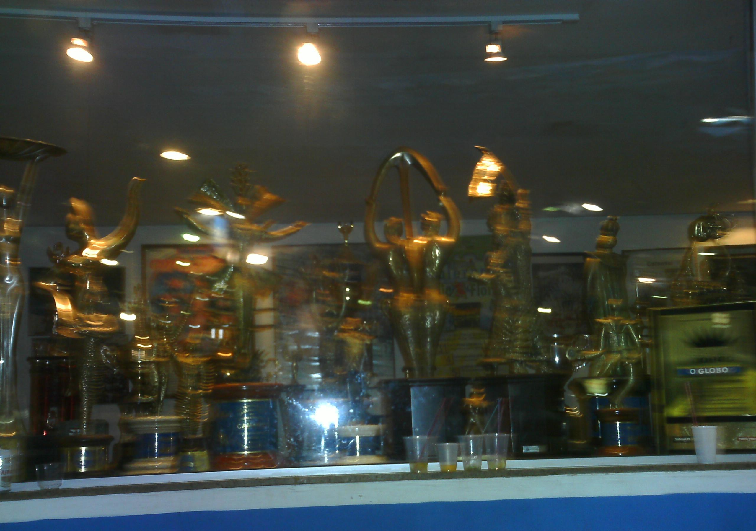 Sala de troféus da Beija-Flor.